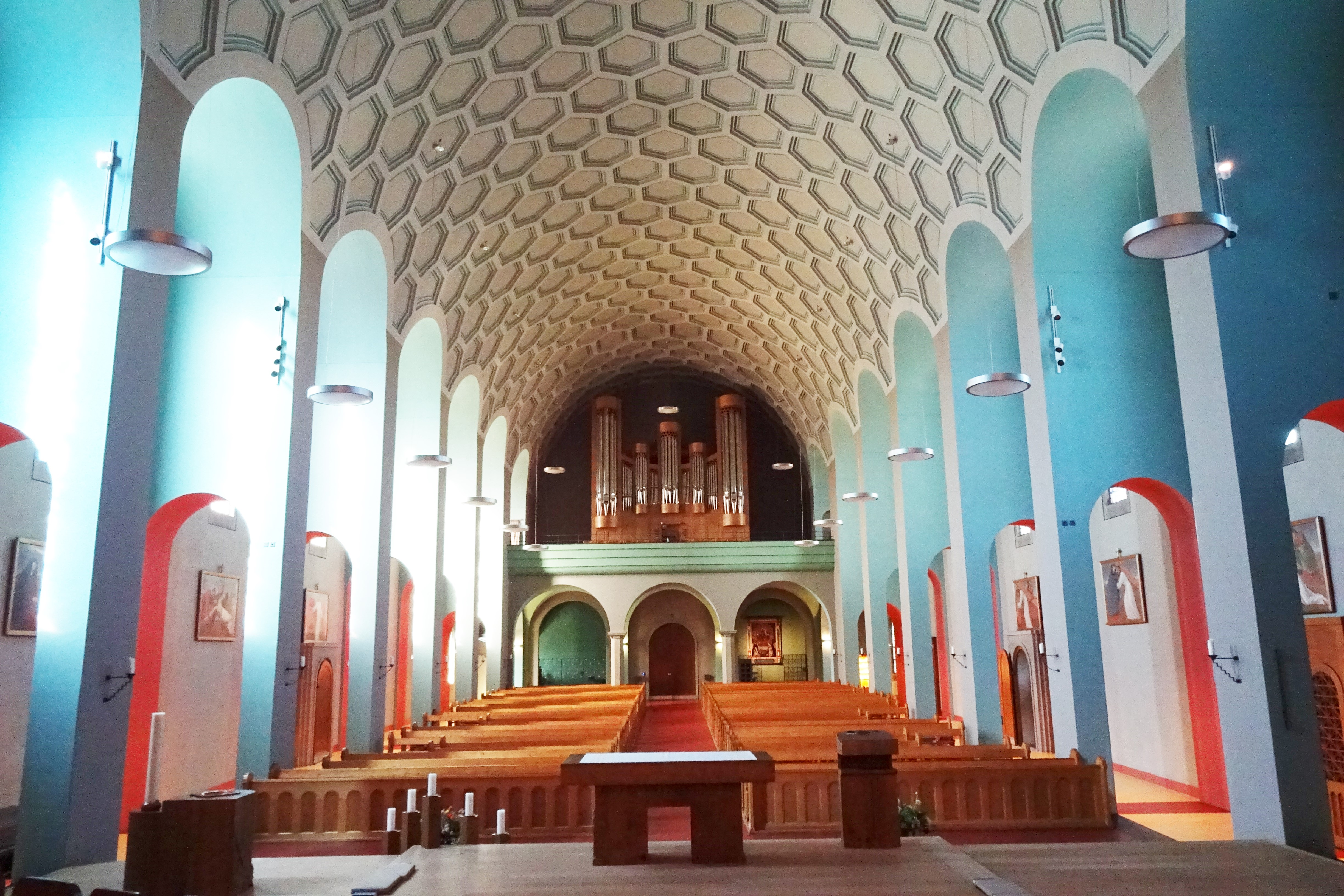 Wünnewil-Flamatt – Pfarrkirche St.Margaretha, KGS-Nr 13364 (Augustin Genoud-Eggis, 1932): Innenansicht, Blickrichtung Orgelempore